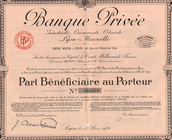 privée 1917